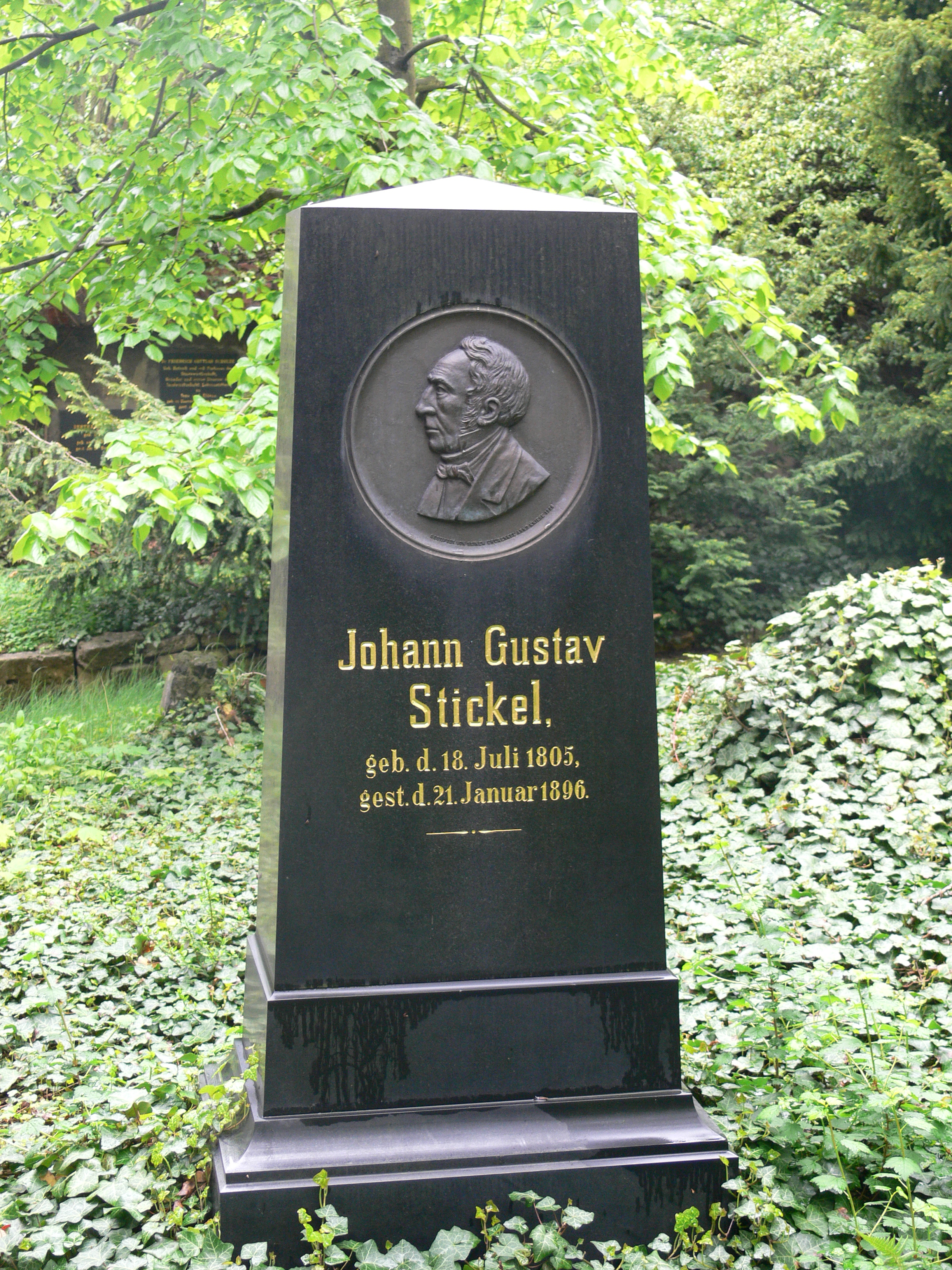 Jena, Johannisfriedhof Grabmal Johann Gustav Stickel